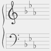 Znaki chromatyczne w gamie c-moll